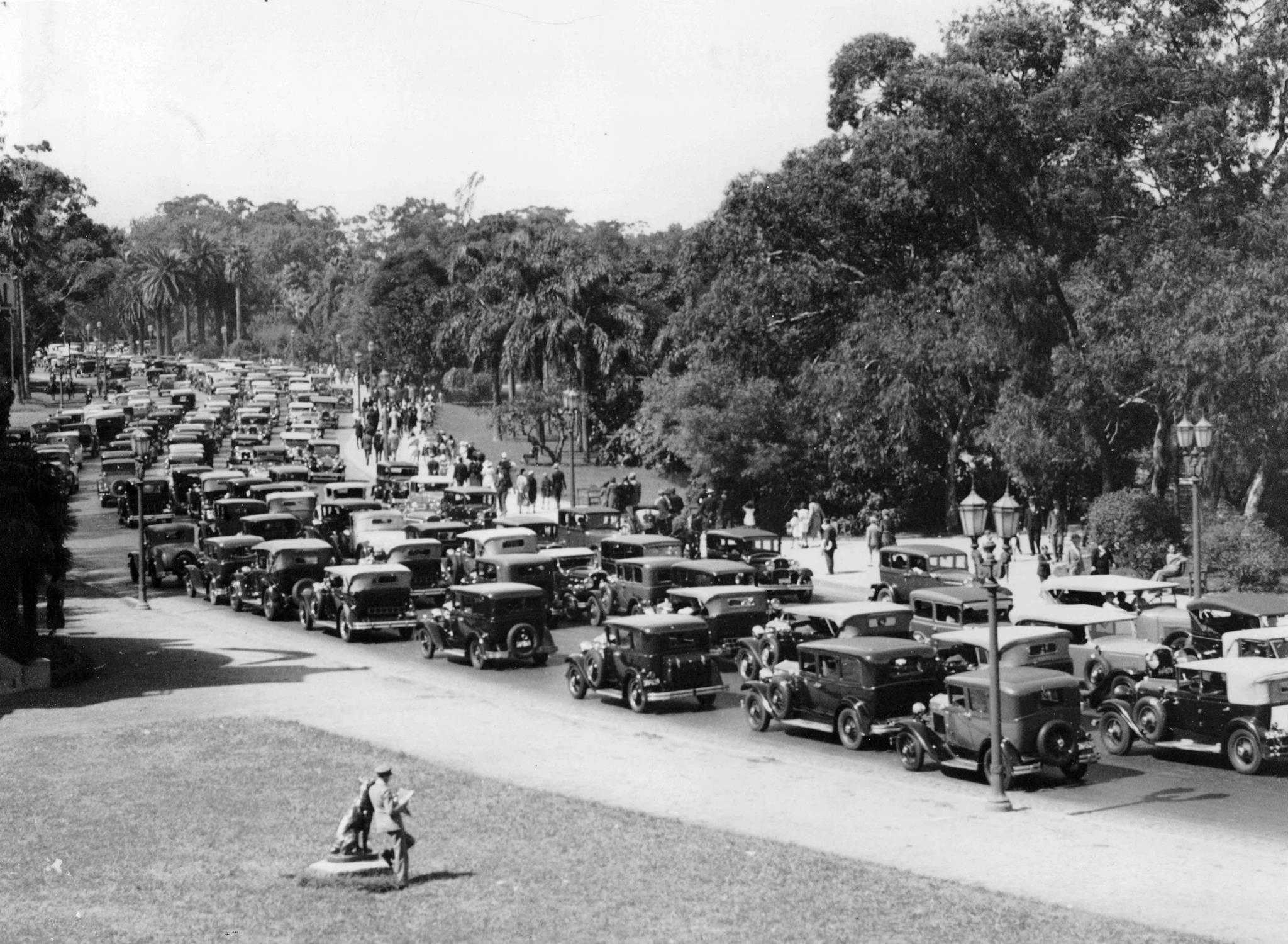 Buenos Aires. "Corso" dominical en el Parque 3 de Febrero, primeras décadas del siglo XX. Circulación vehicular por la izquierda. Inventario AGN 10063.